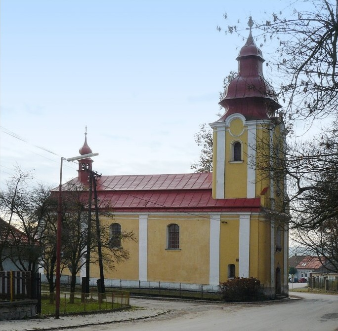 Kostel svatého Vavřince v Krasonicích